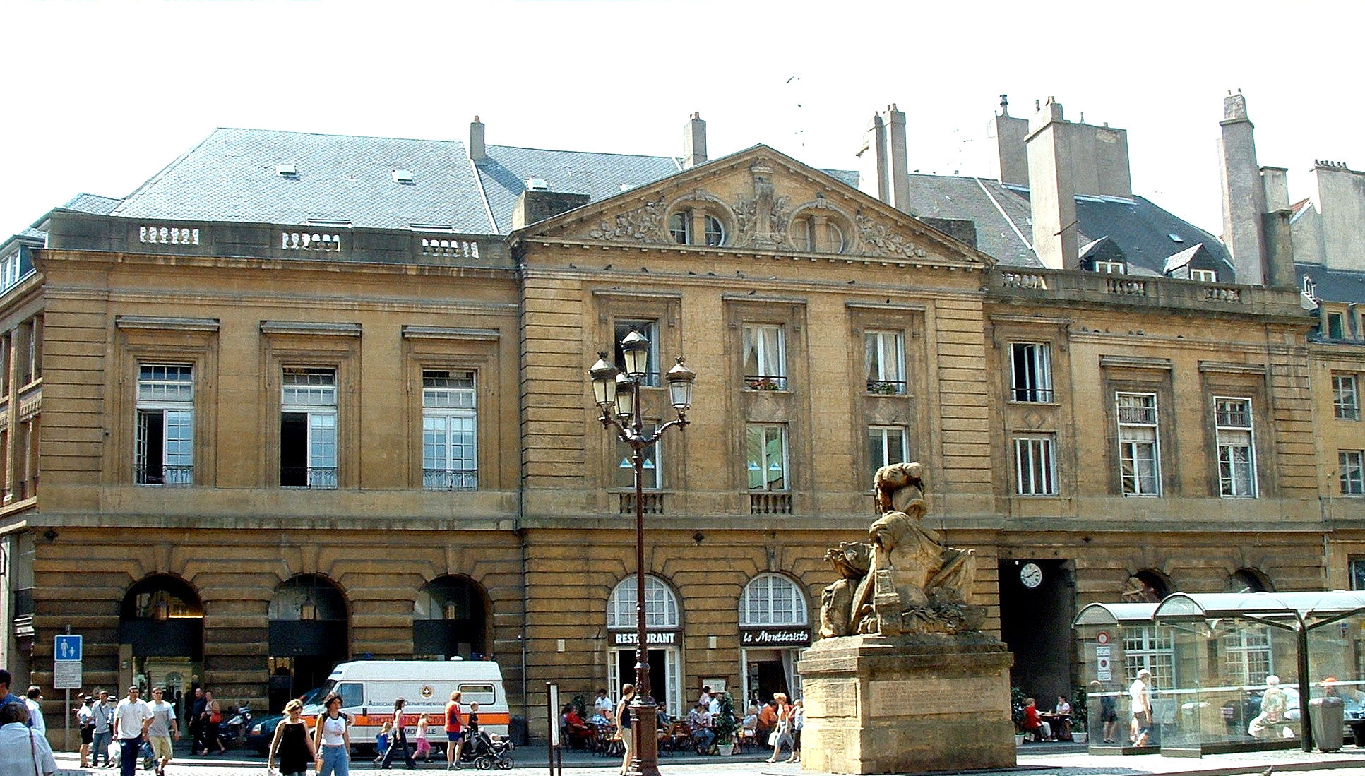 Metz - Ancien parlement sur la place d'Armes